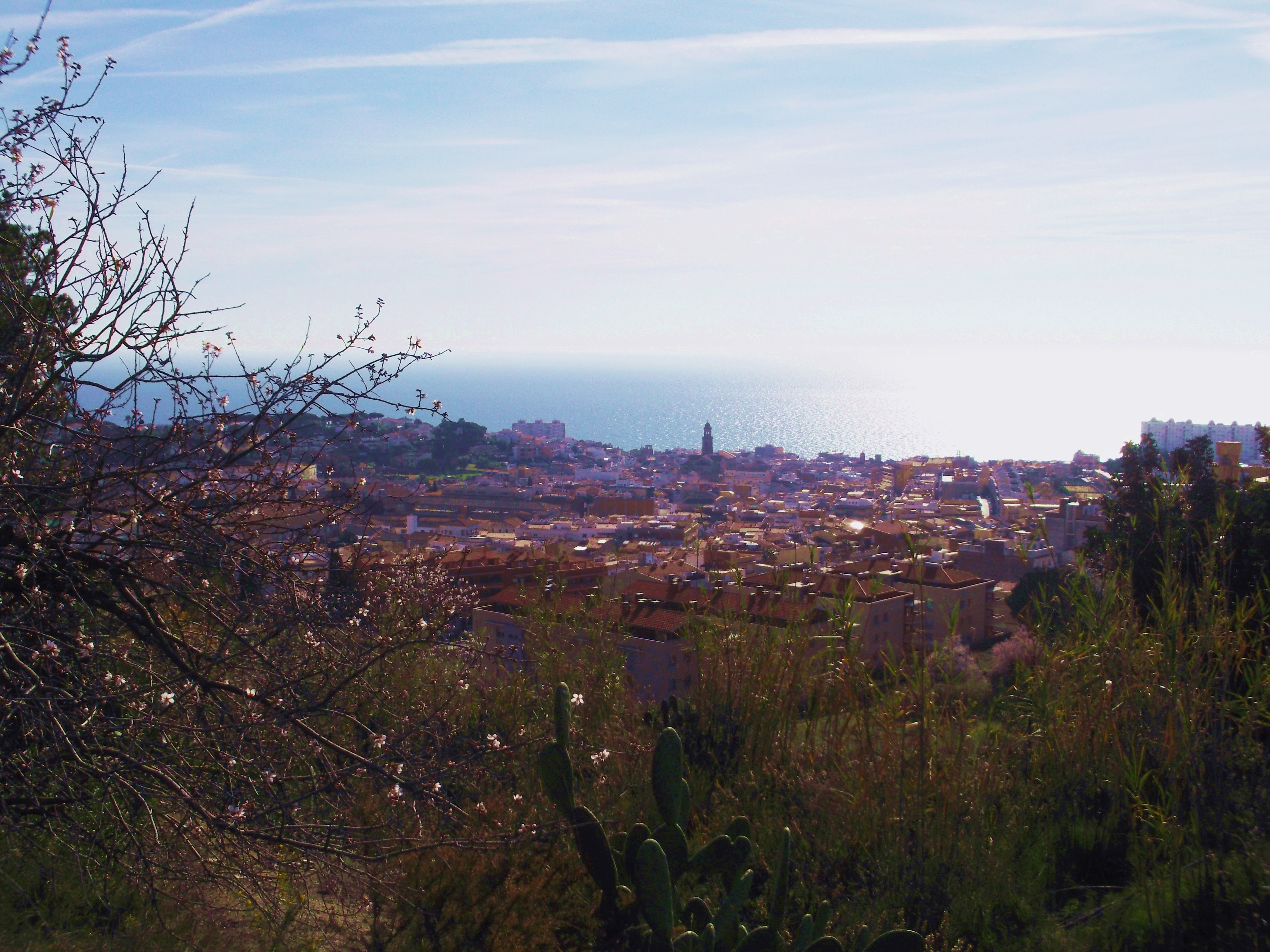 Canet